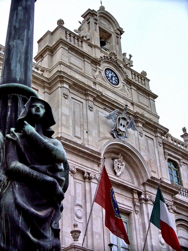 Dettaglio del Palazzo dell'Università